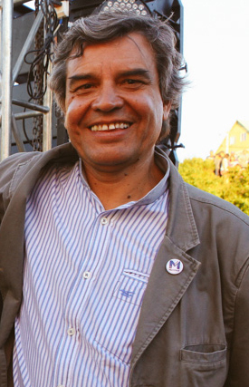 Alejandro Goic Jerez, actor chileno.